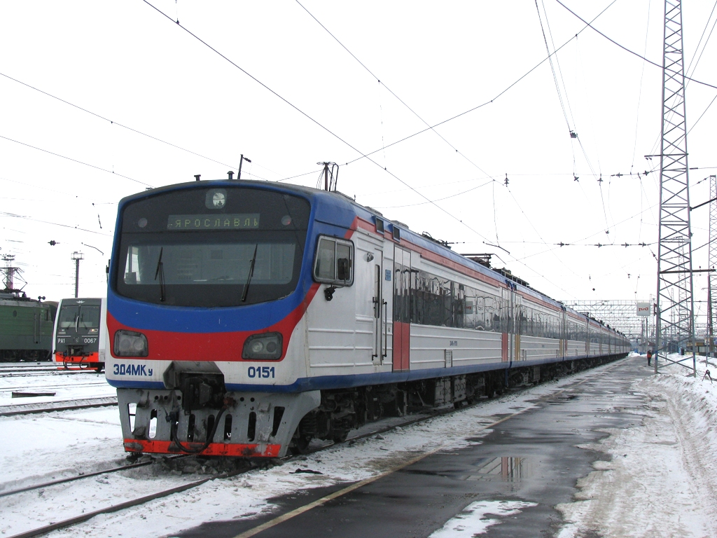 Электропоезд ЭД4МКу на станции Ярославль-Главный